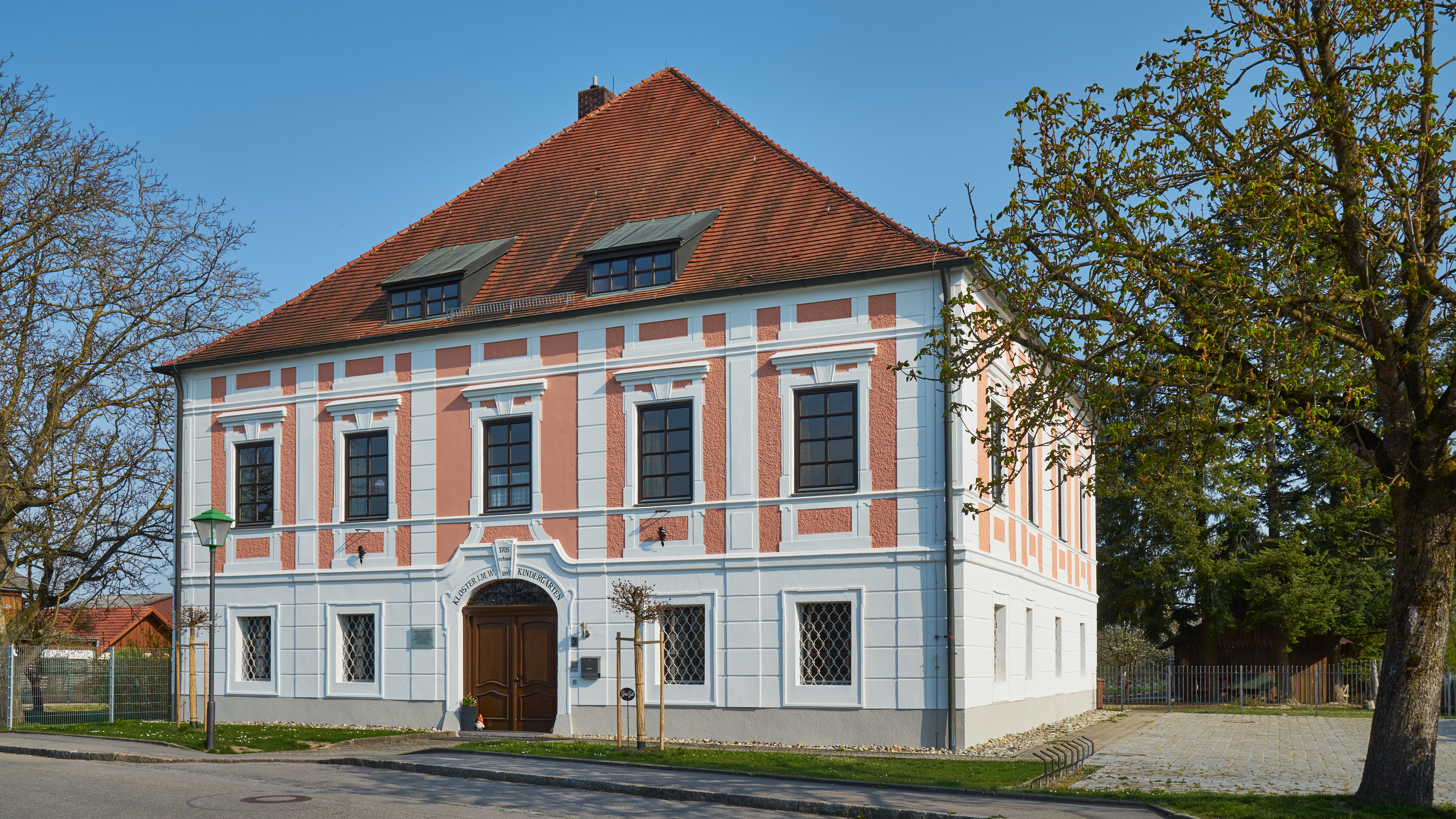 Ehemaliges fürstbischöfliches Schloss Neuriedenburg, zweigeschossiger Walmdachbau mit Kniestock und reichen Putzgliederungen, errichtet 1704 als Pflegamtssitz, 1775 Umbau zum Jagdschloss mit Aufstockung, nach Brand 1810 oberes Geschoss abgetragen, ab 1860 Institut der Englischen Fräulein, jetzt Kindergarten.